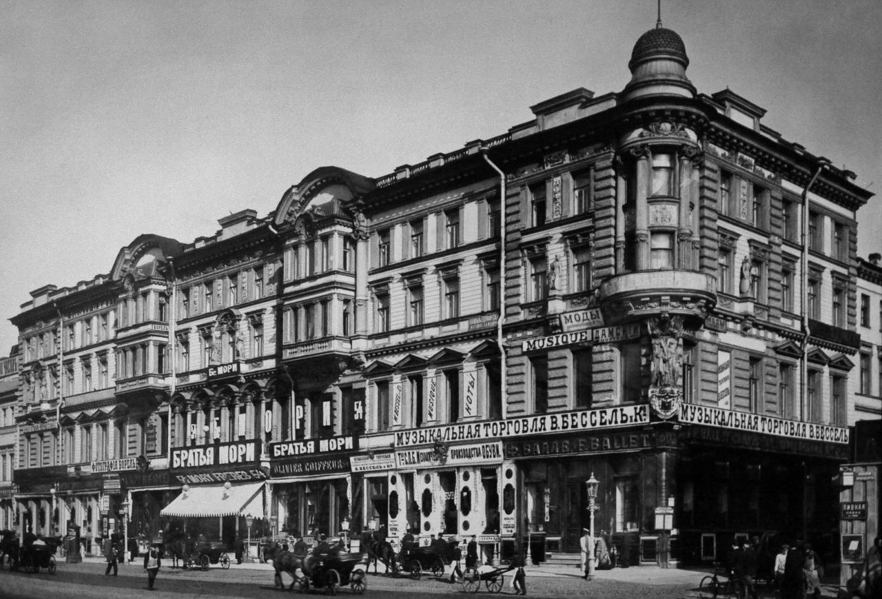 Санкт-Петербург, Невский пр., 54. 1900-е годы. Фотограф К. Булла